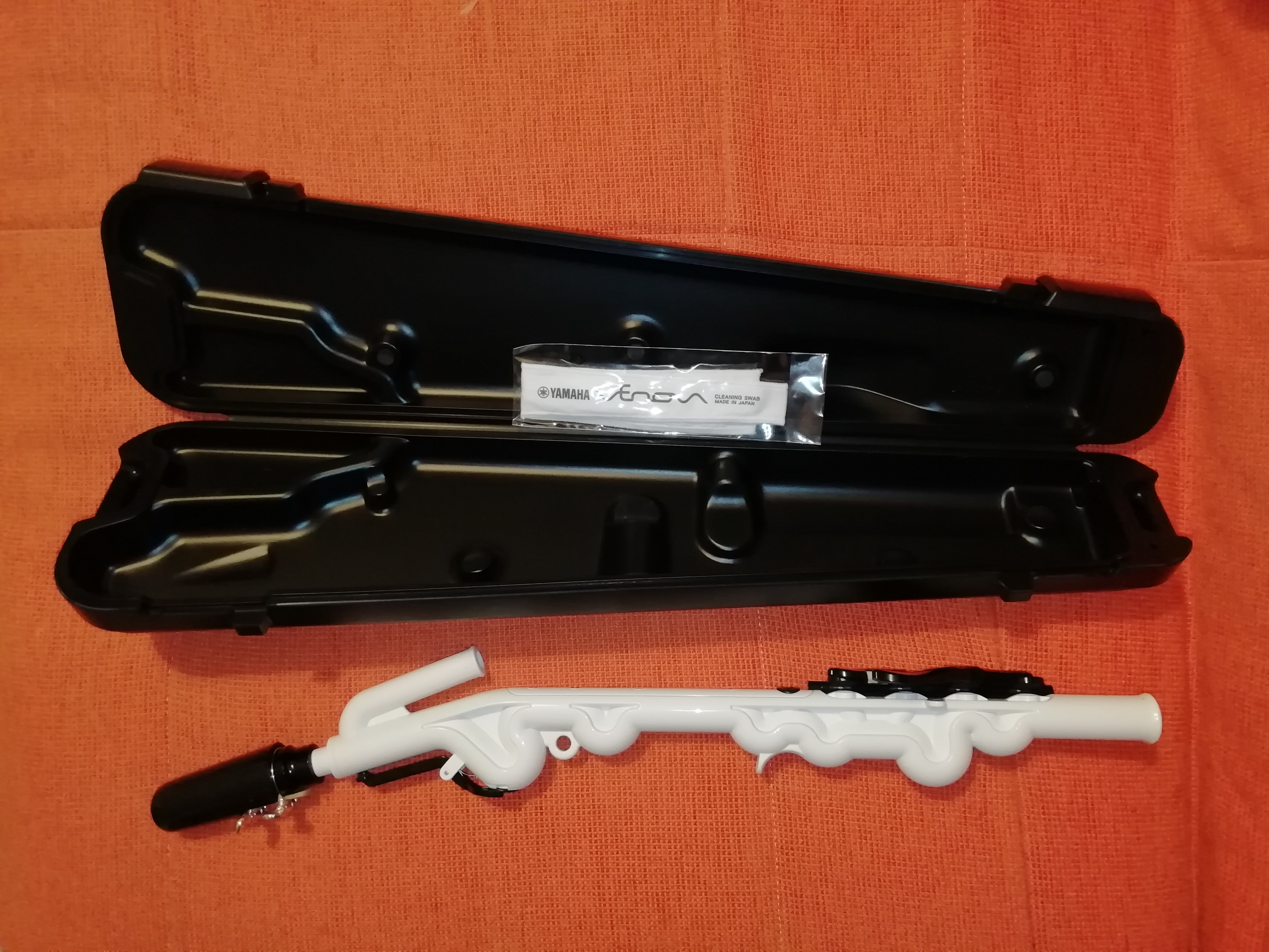 venova